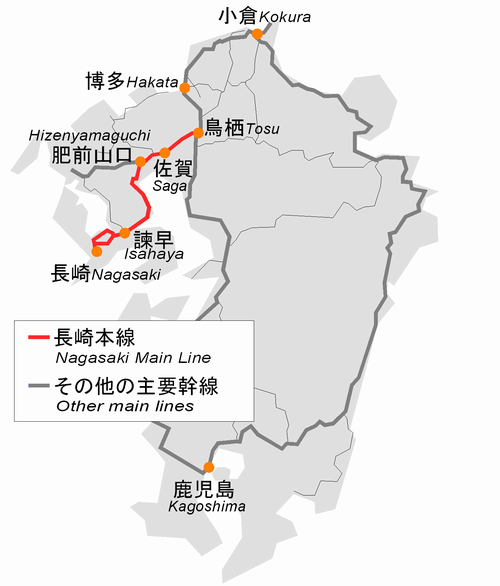 Map of Nagasaki Main Line , Kyushu Japan.